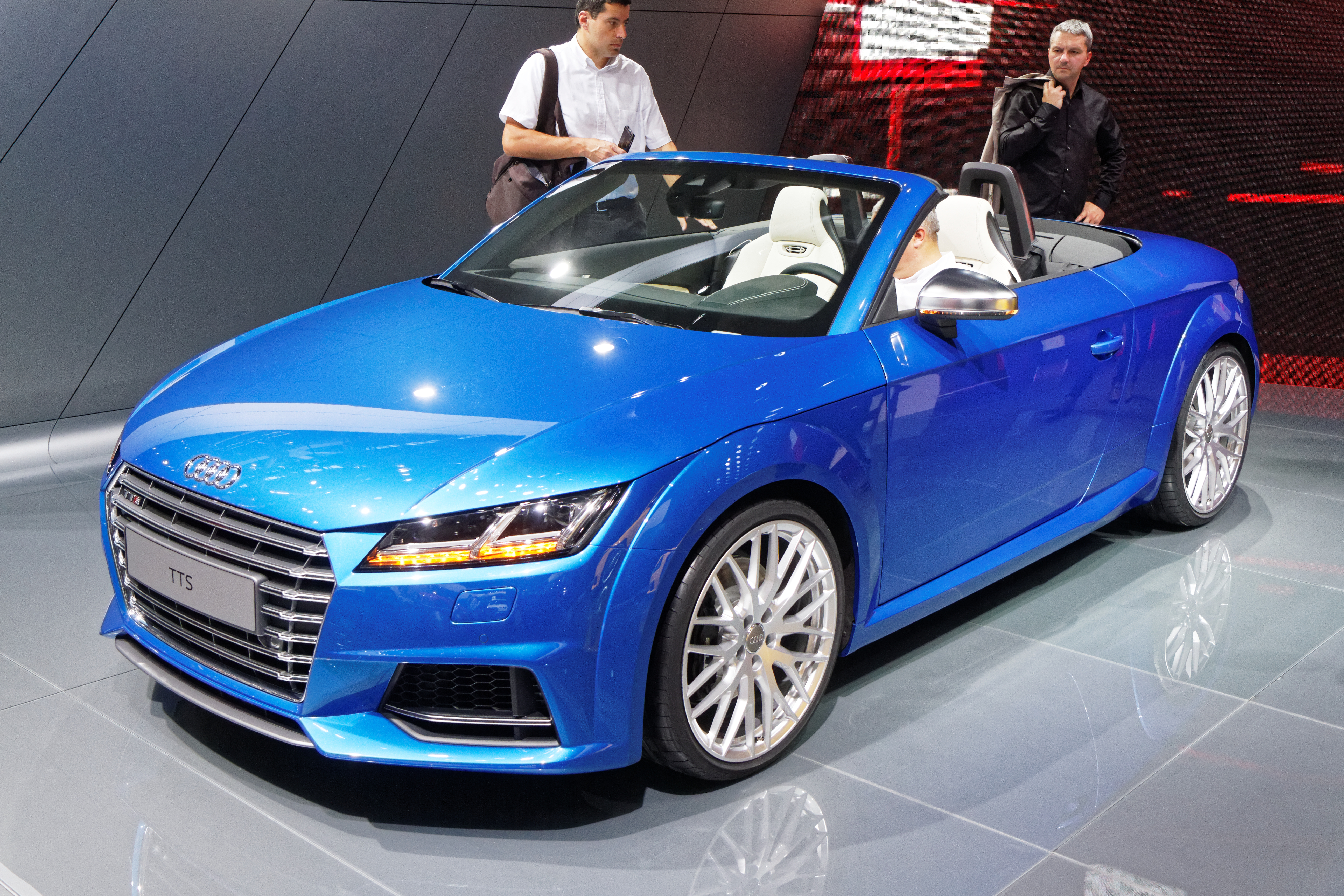 Une Audi TTS présentée lors du mondial de l'automobile de Paris 2014.